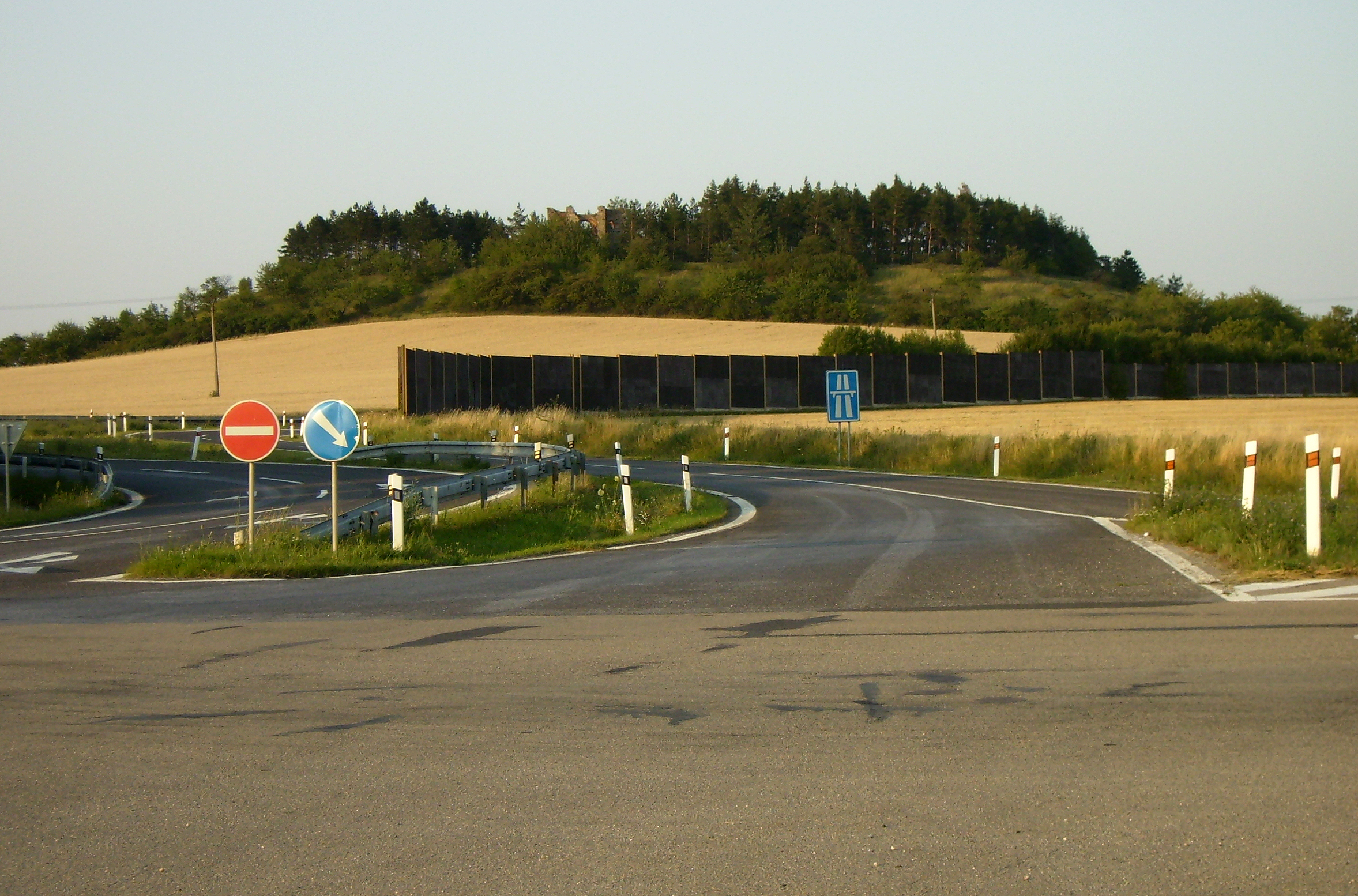 Břístevská hůra u dálnice D11, sjezd na 18. kilometru.